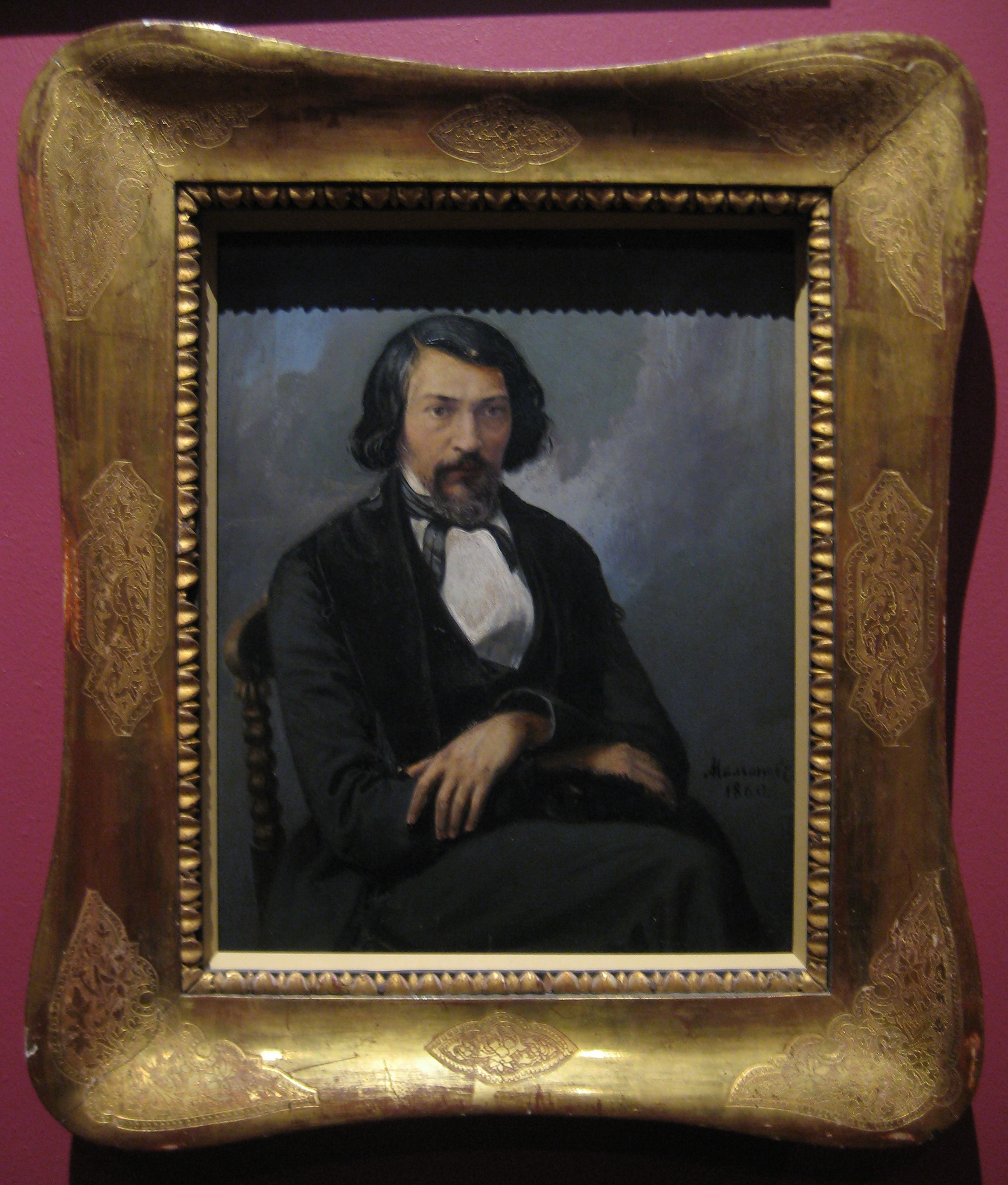 Выставка "Национальная портретная галерея", ГИМ, 2012